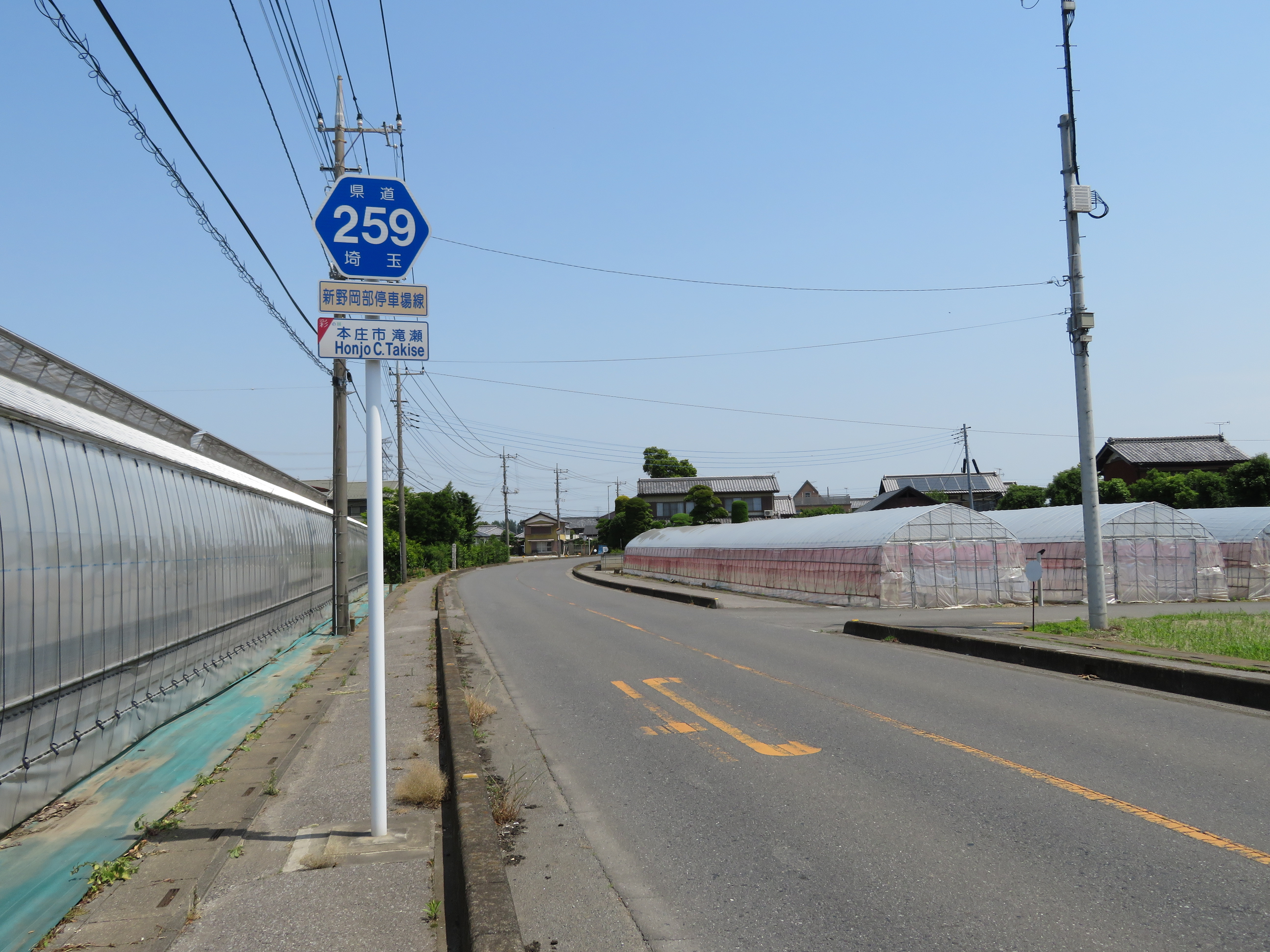 埼玉県道259号線本庄市滝瀬付近 Canon PowerShot SX720 HS